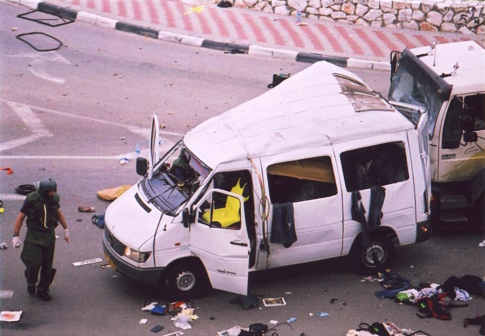 זירת הפיגוע בצומת מי עמי